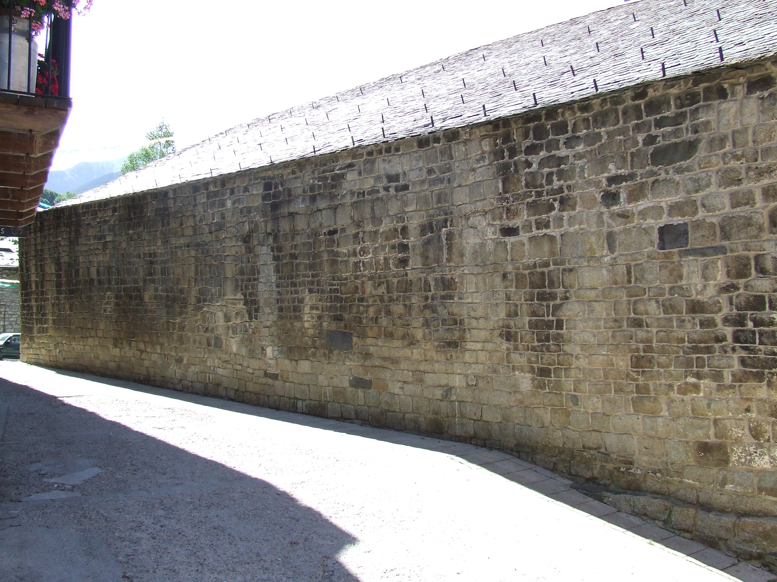 Façana septentrional de Santa Maria de Taüll (Vall de Boí, Alta Ribagorça)